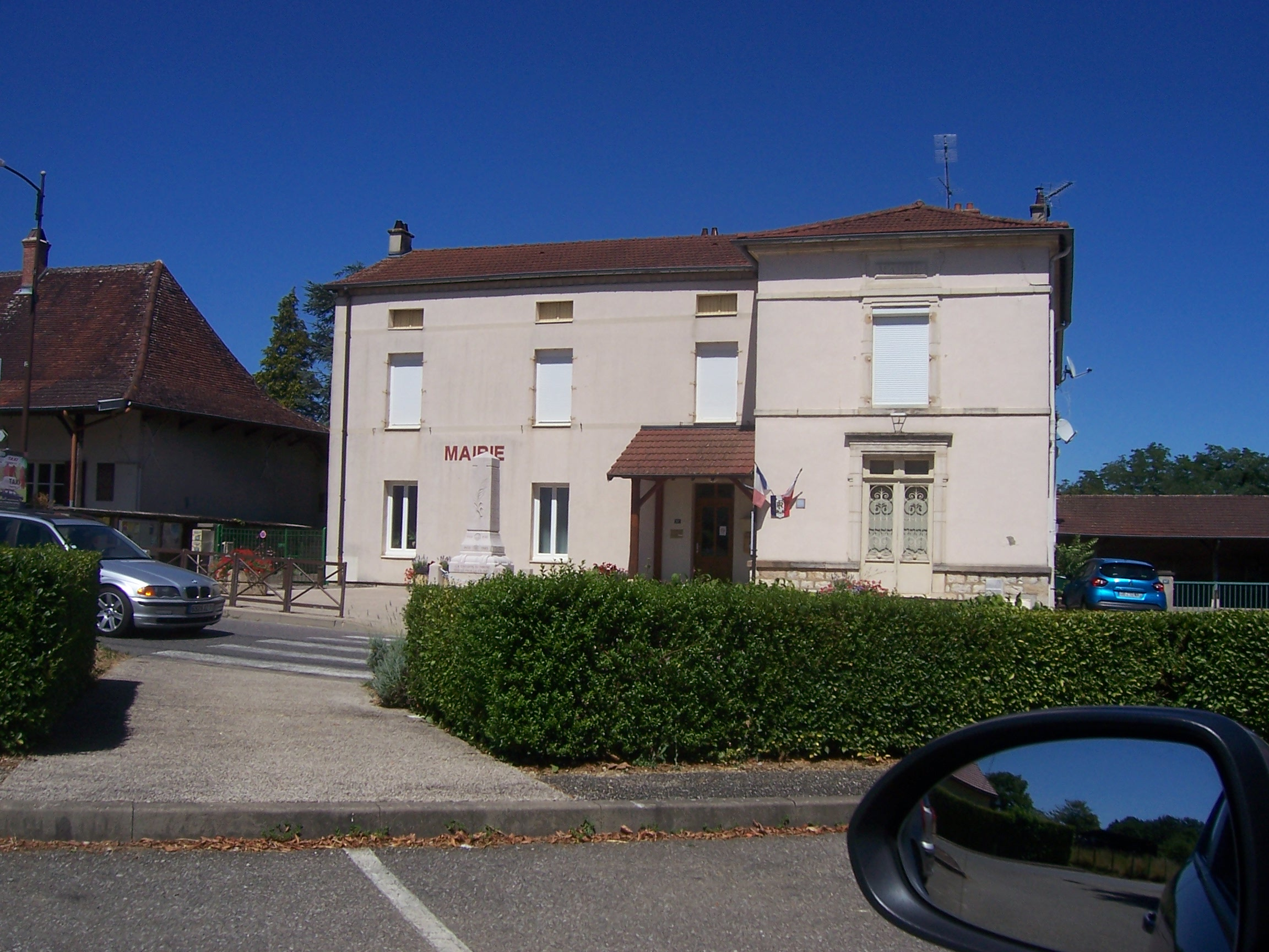 Mairie du Miroir